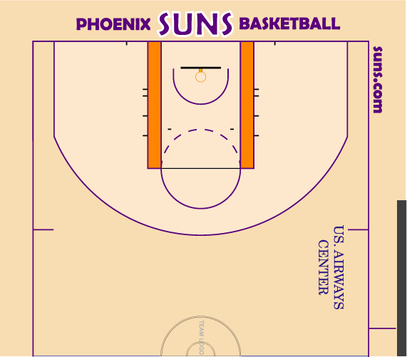 サンズホームコート配色